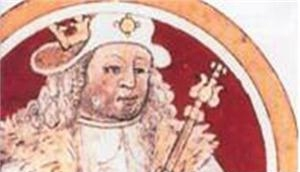 Détail d'une miniature, folio 170 v., Manuscrit Koning, MS II 270, Bibliothèque royale de Belgique, Bruxelles.